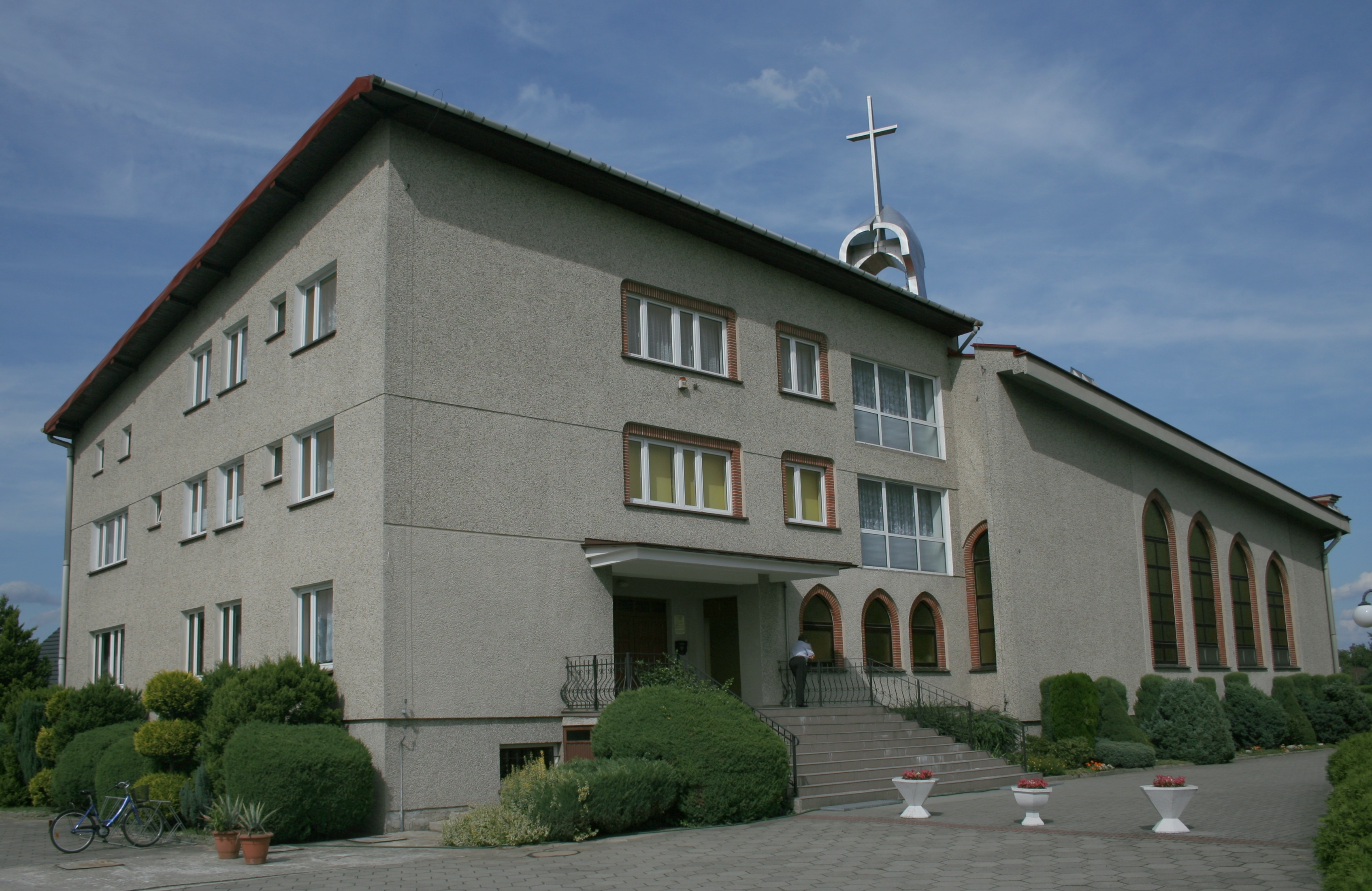 Kostel svatého Alberta v Kamieni, součásti Rybniku, Polsko